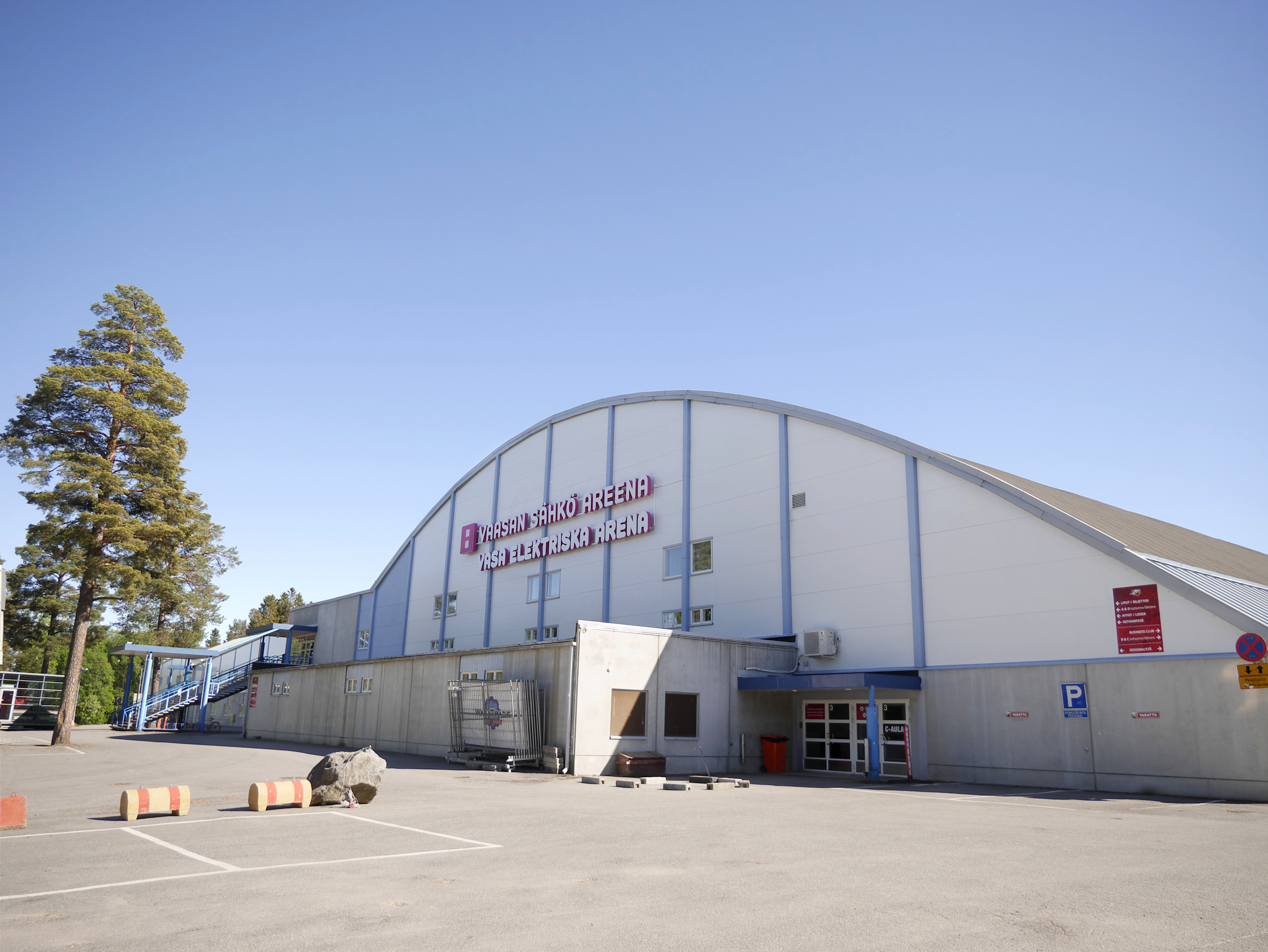 Vaasan Sähkö Areena -jäähalli.